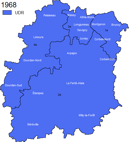 Carte politique des circonscriptions de l'Essonne (91) après les élections de 1968.